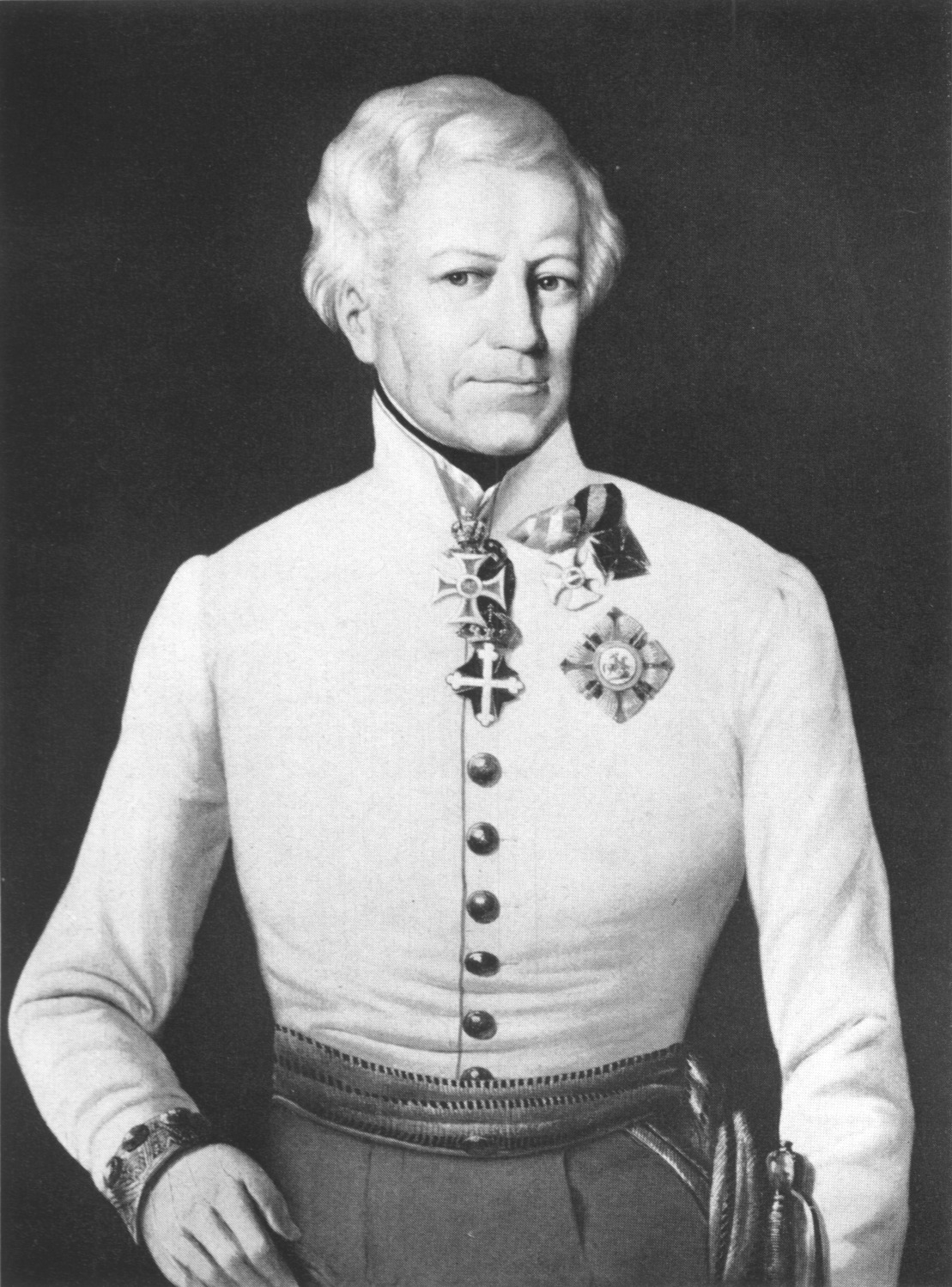 Joseph von Stutterheim (1764-1831) kk Wirklicher Geheimer Rat, Hofkriegsrat, Feldmarschallleutnant